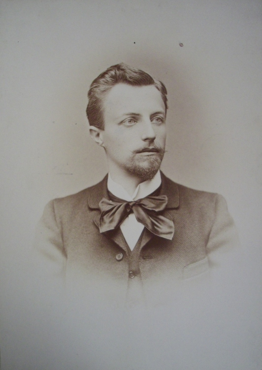 Julius Leisching (1865 - 1933), österreichischer Architekt und Museumsdirektor